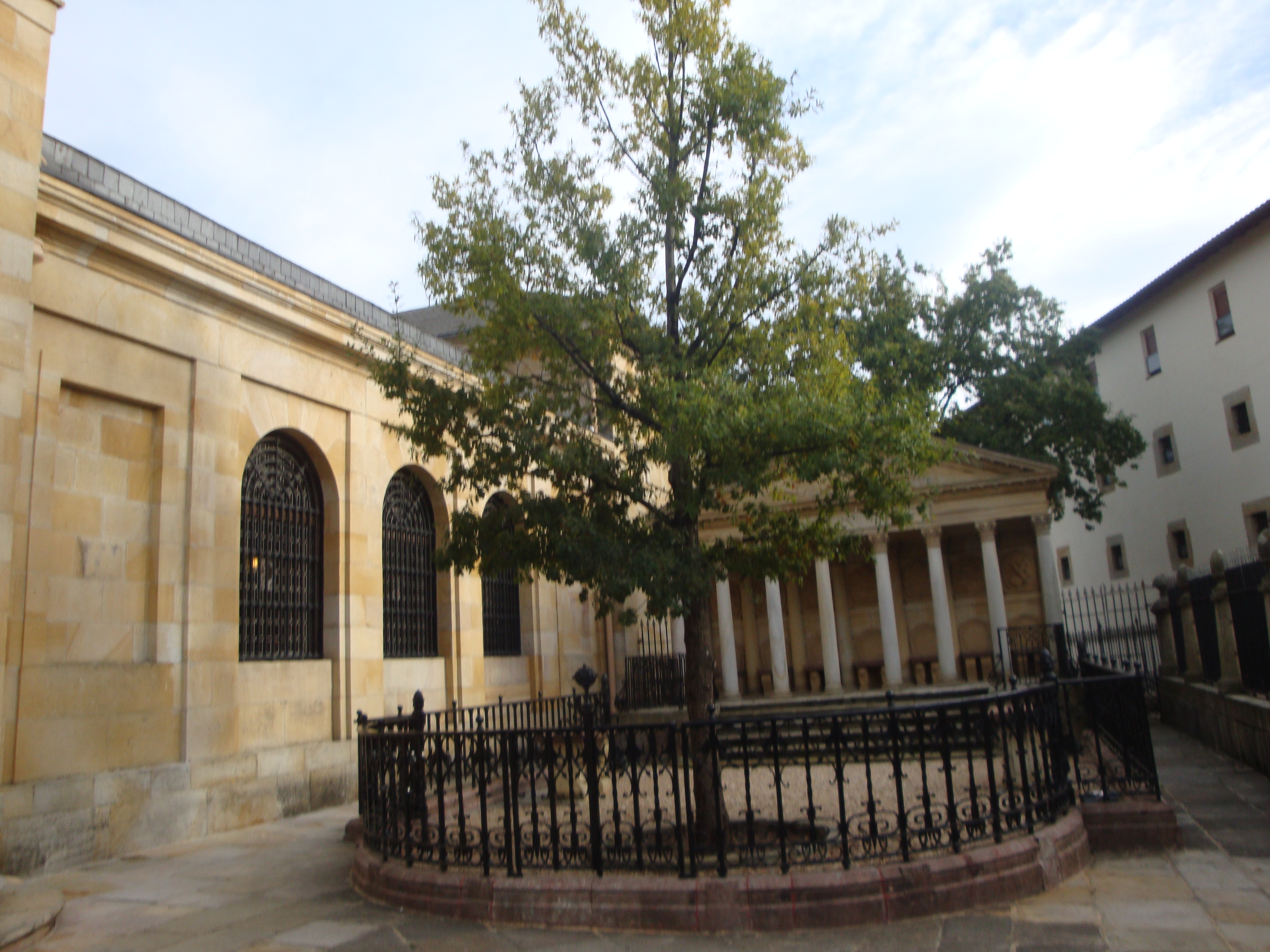 Roble de Gernika Vizcaya